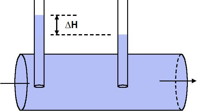 gebaseerd op nl::Afbeelding:Pitotbuis.jpg zelf aangepast; opnieuw PD